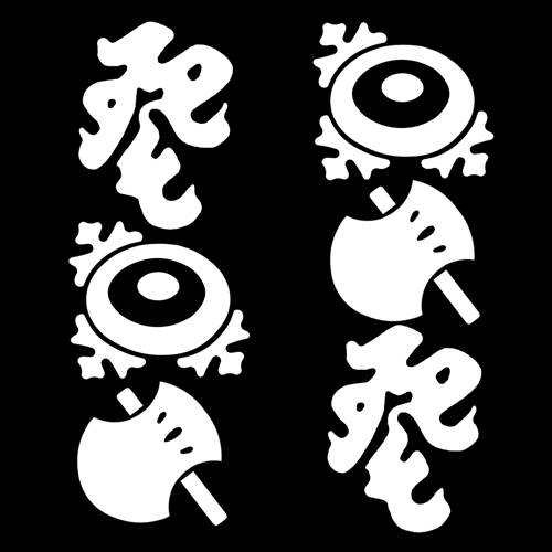 役者文様「斧琴菊」（染抜）